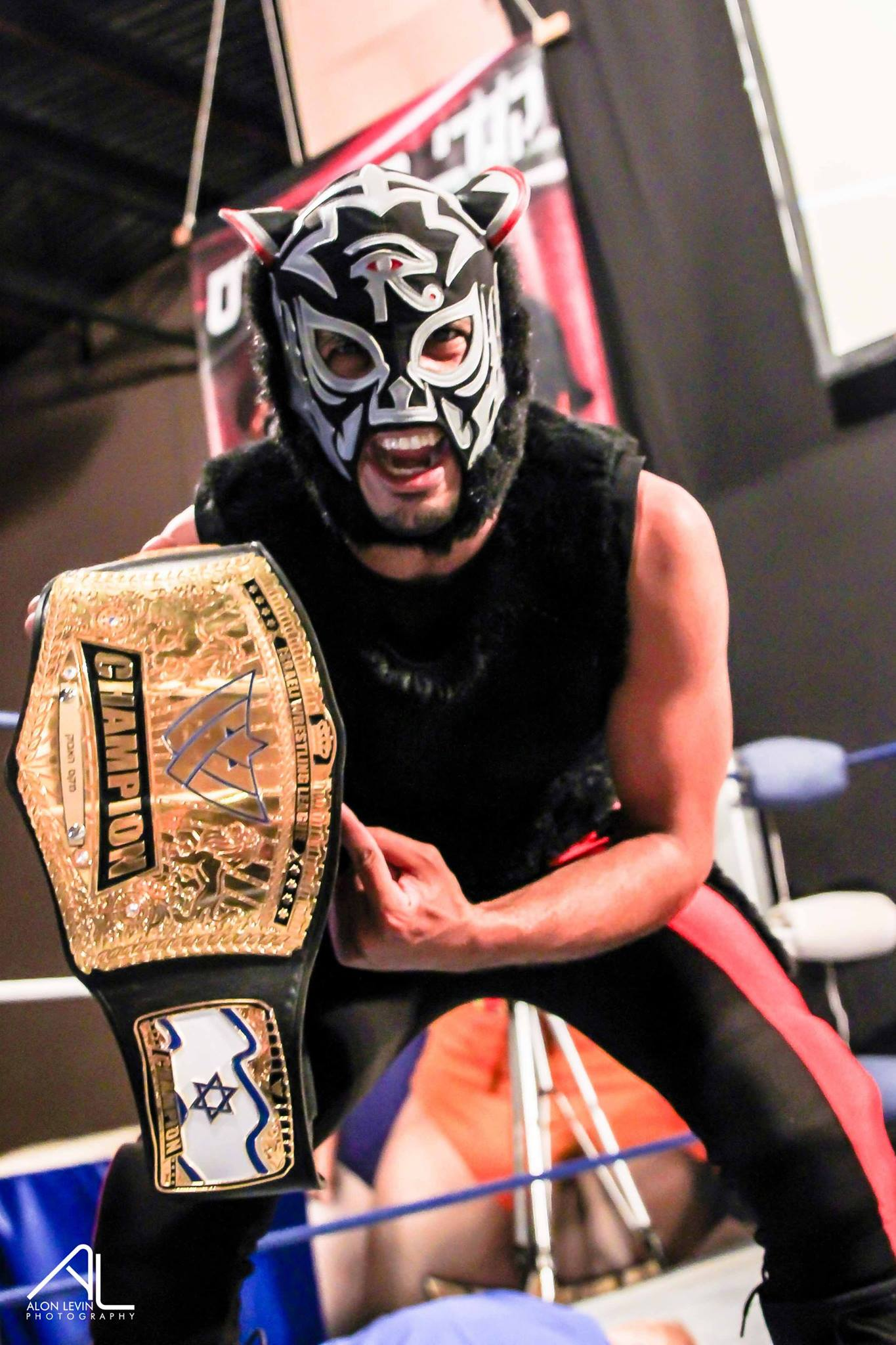 אלוף ליגת ההיאבקות הישראלית השלישי - הנמר השחור, לאחר הזכיה בתואר במופע IWL 10 (צילום: אלון לוין)